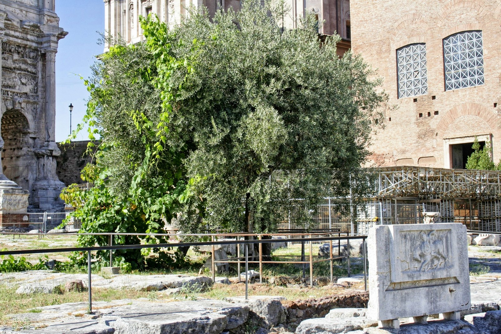 Aire du Figuier, de l'Olivier et de la Vigne.